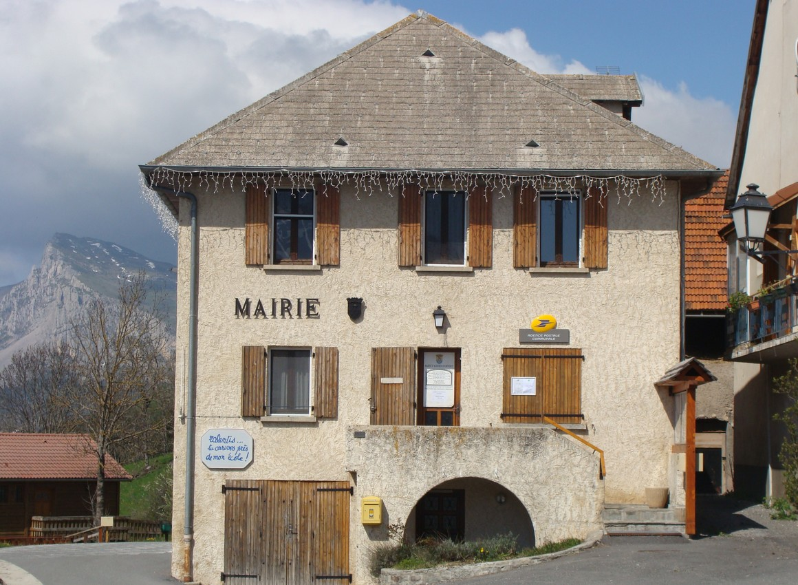 L'ancienne mairie d'Agnières-en-Dévoluy, désormais mairie-annexe de la commune nouvelle du Dévoluy.